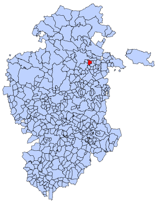 Quintanaélez en Burgos